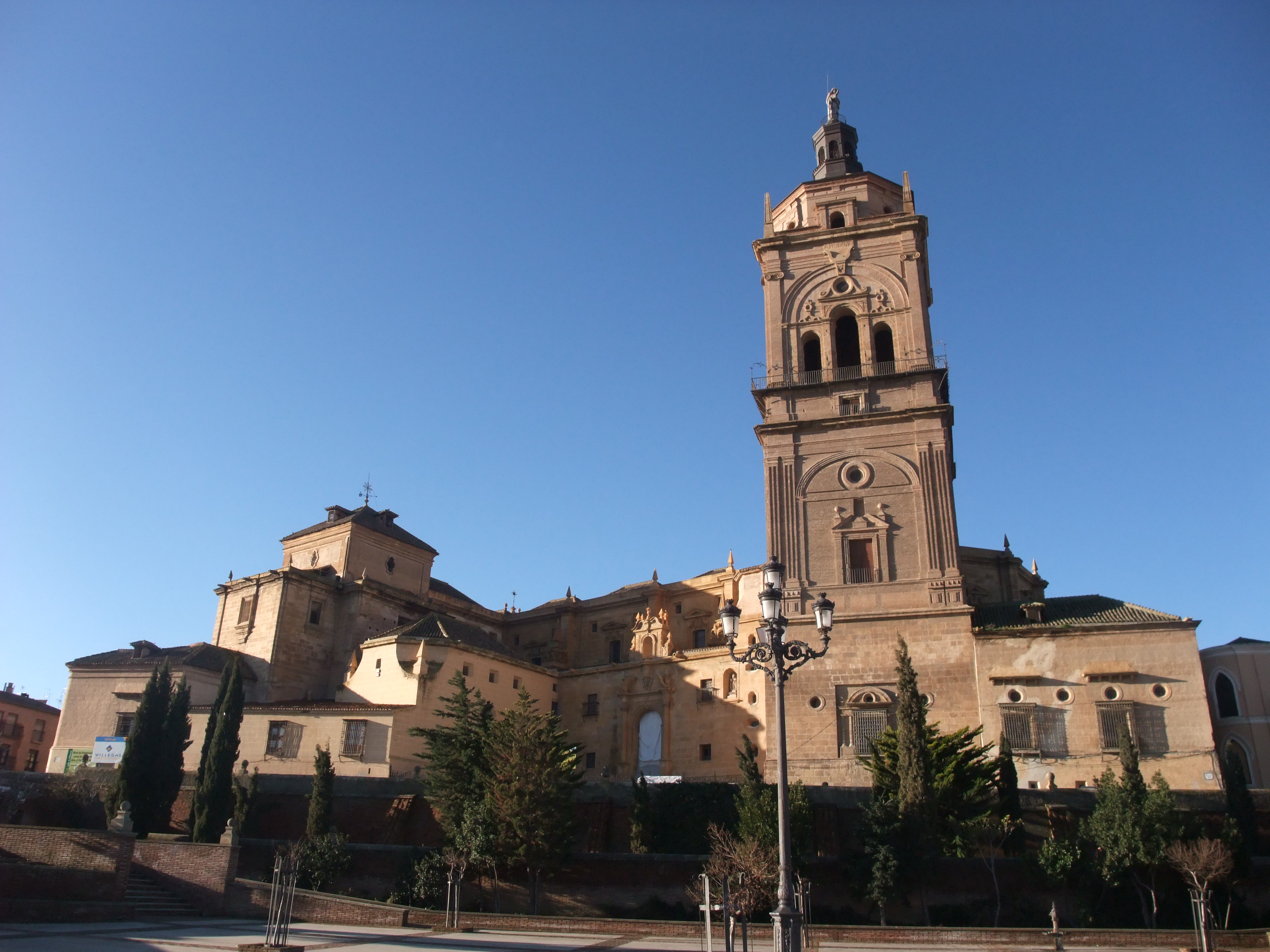 Guadix (Granada)-Catedral-1